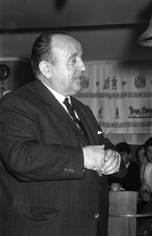 Bayerische Kommunalpolitiker mit Minister Höcherl in der Landesvertretung Bayern und Jugendgruppe Volkshochschule Hesselberg